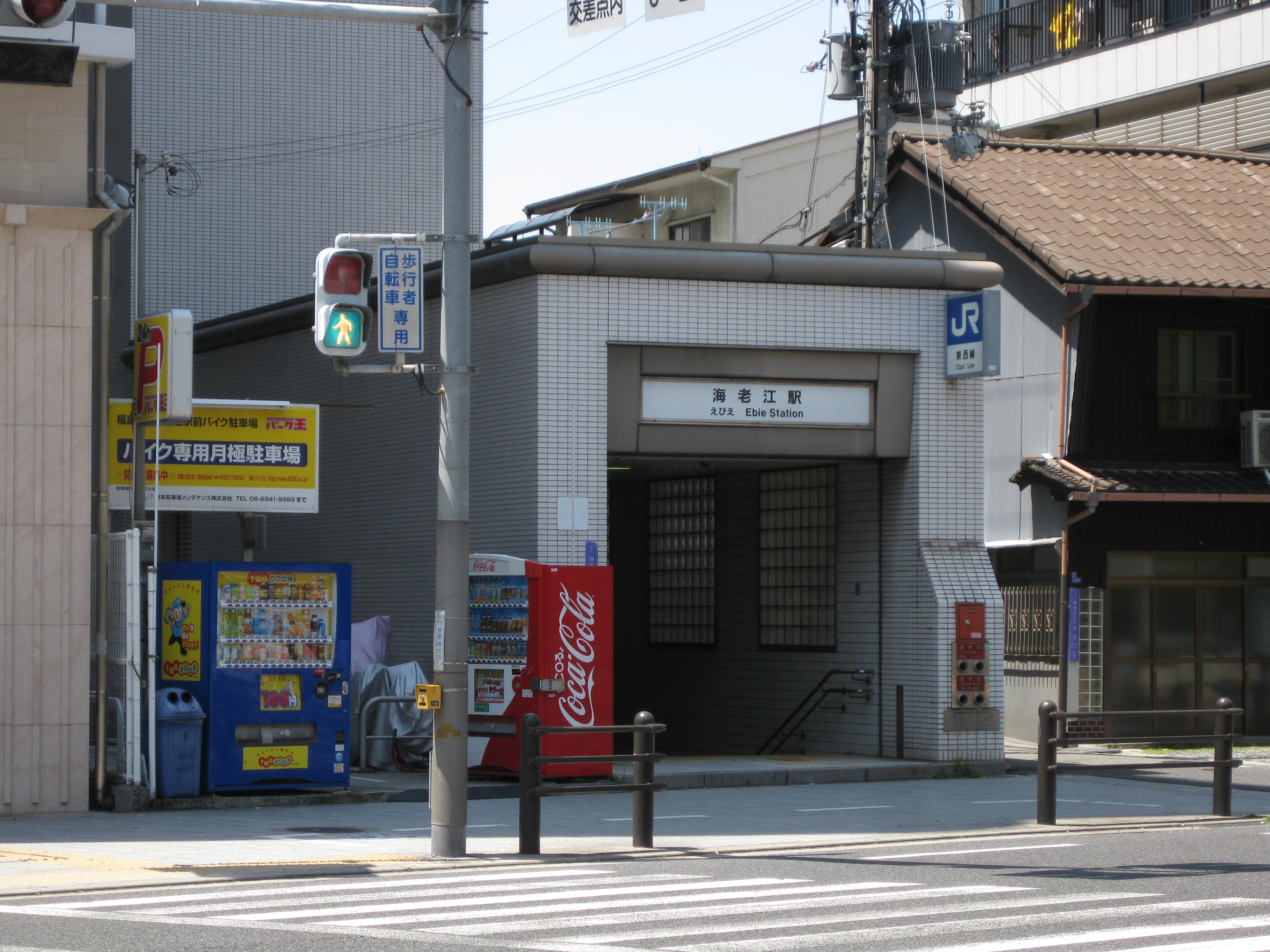 海老江駅2号出口